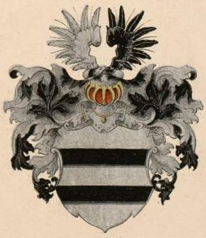 Mengdeni suguvõsa aadlivapp.